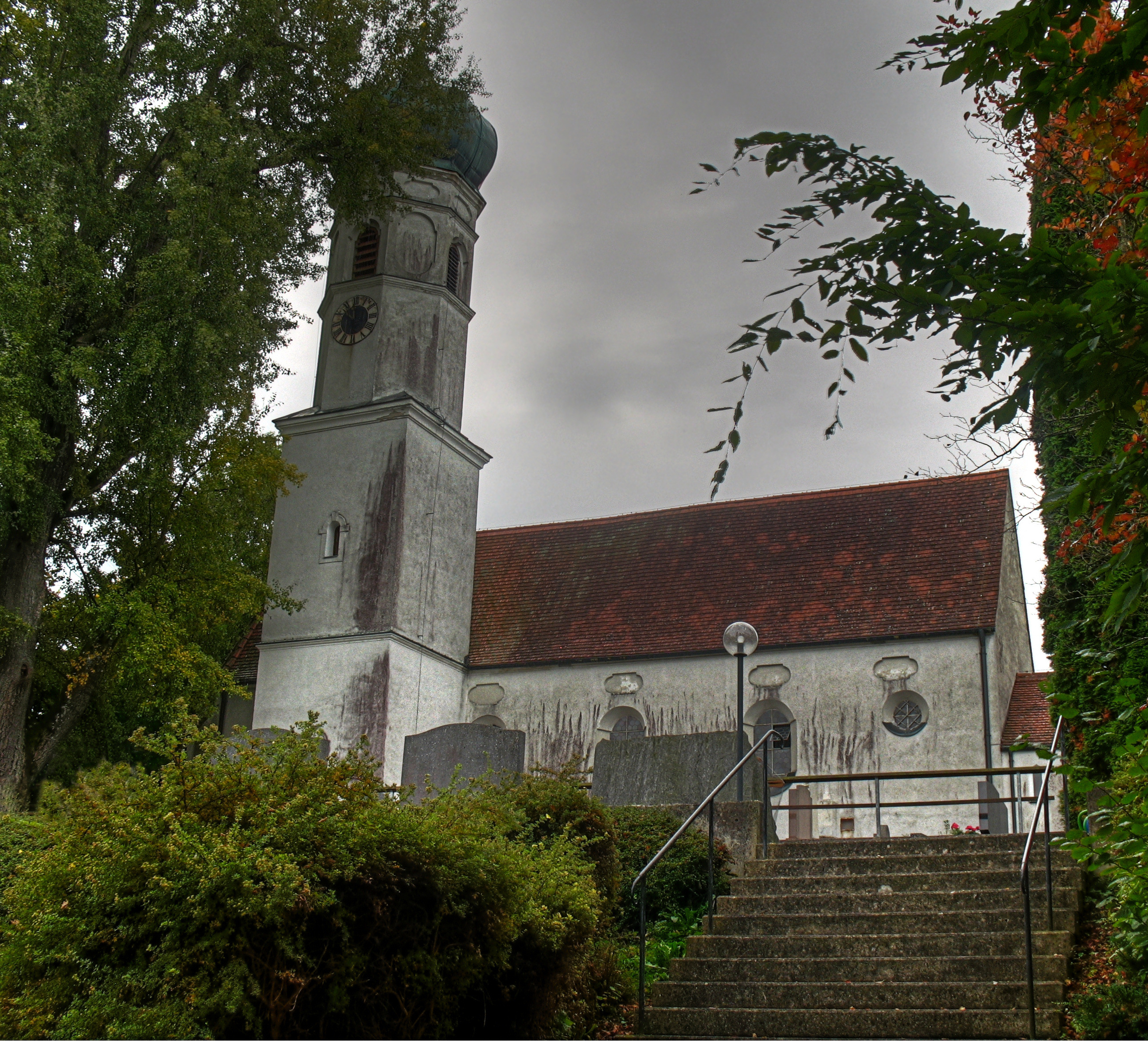 Deutschland, Bayern, Landkreis Dachau, Bergkirchen, Lauterbach, Filialkirche St. Jakob